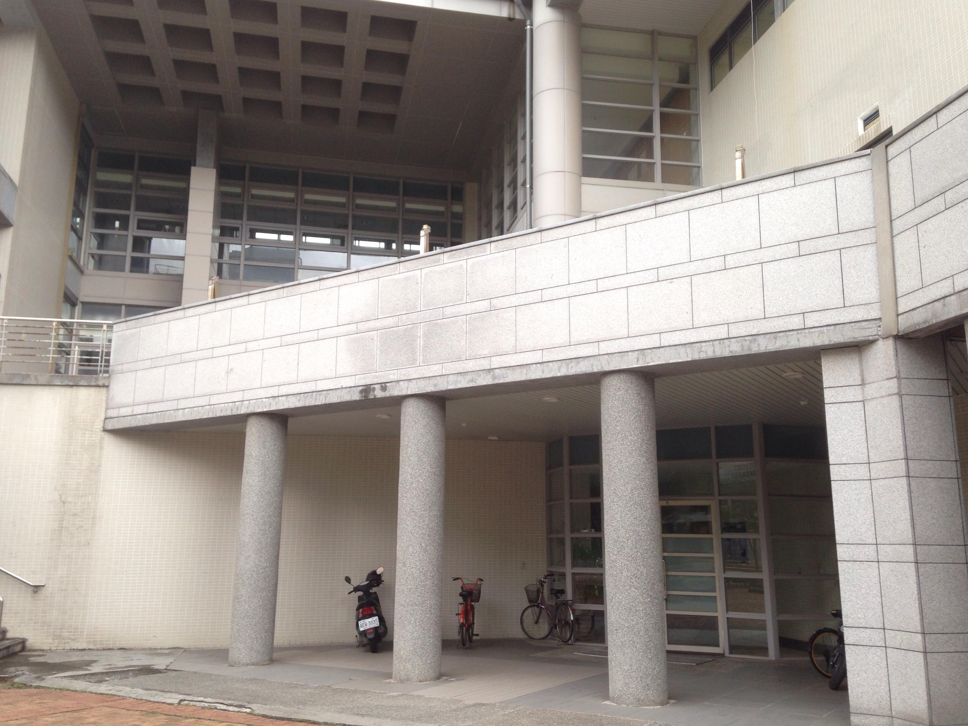 國立陽明大學圖書資訊暨研究大樓